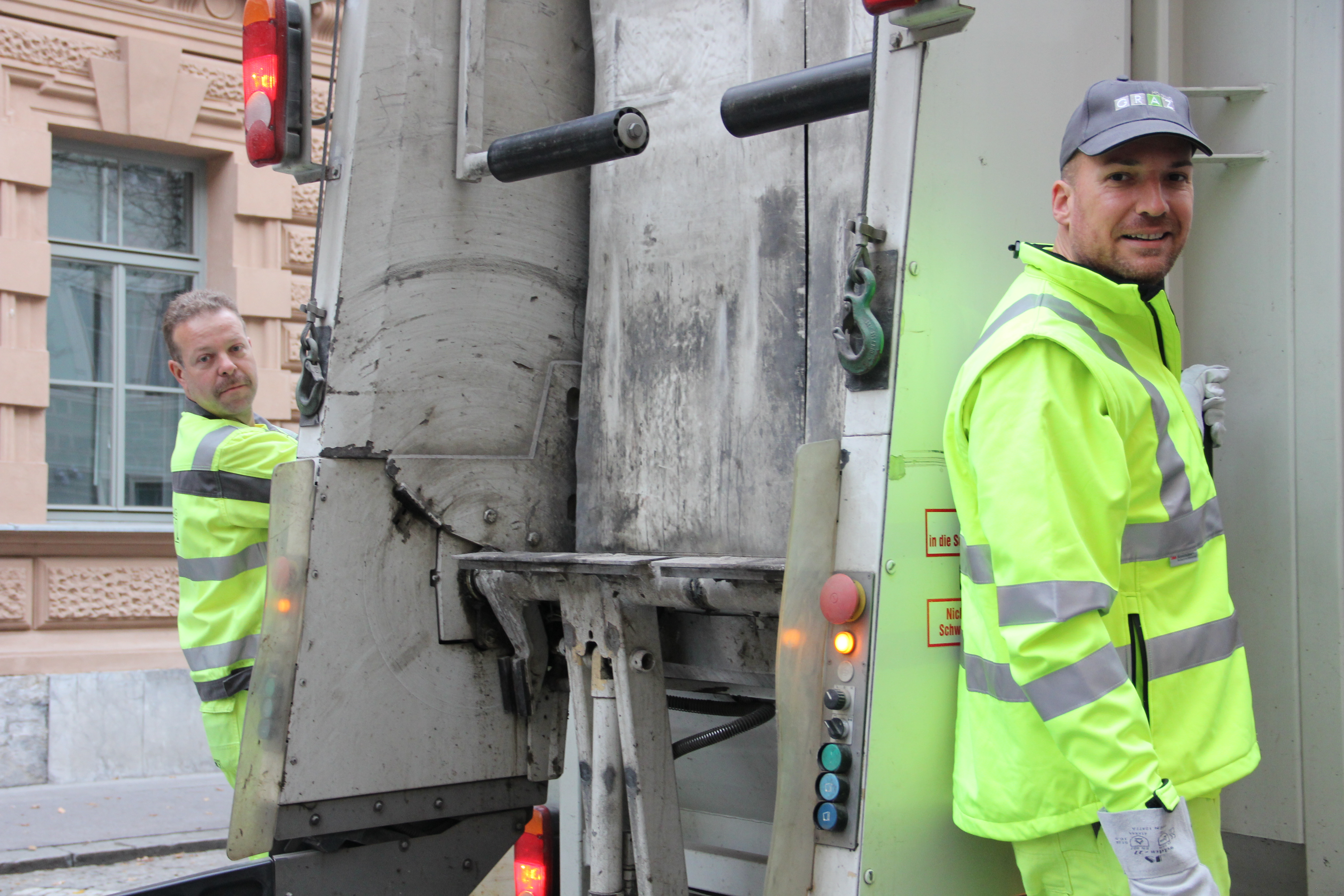 (c) Kevin Griebaum / Holding Graz